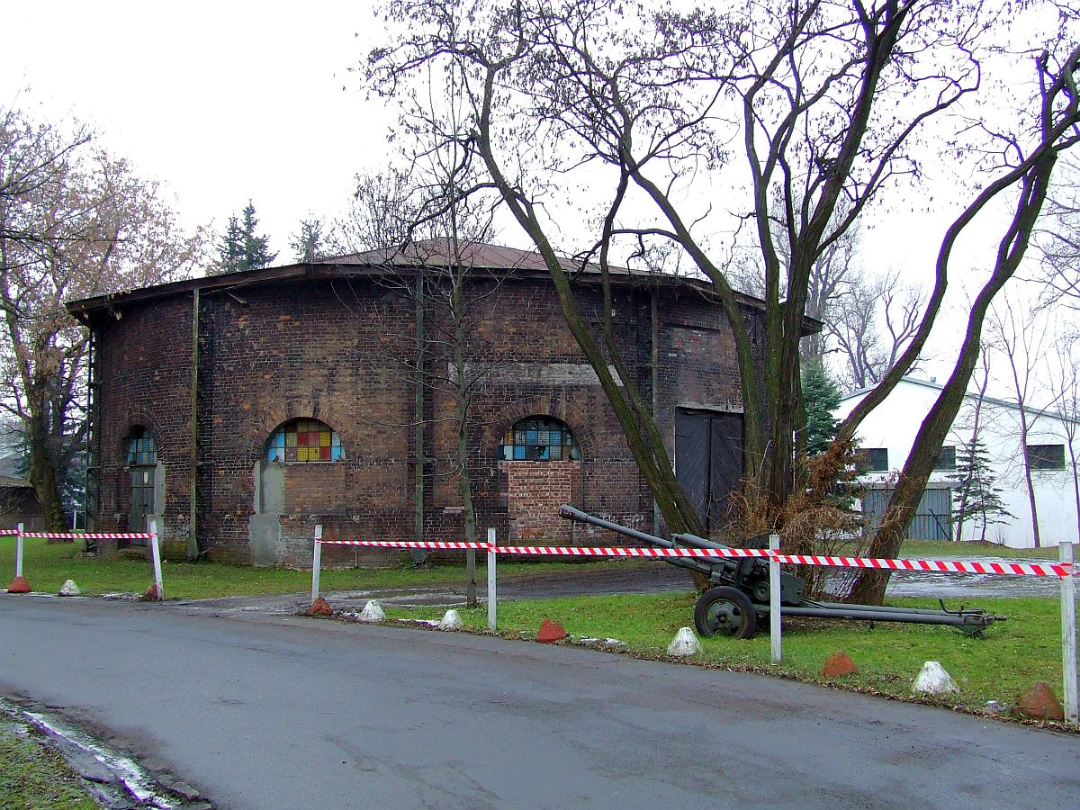 Twierdza Warszawa, spichlerz na Powązkach, ul. Kozielska